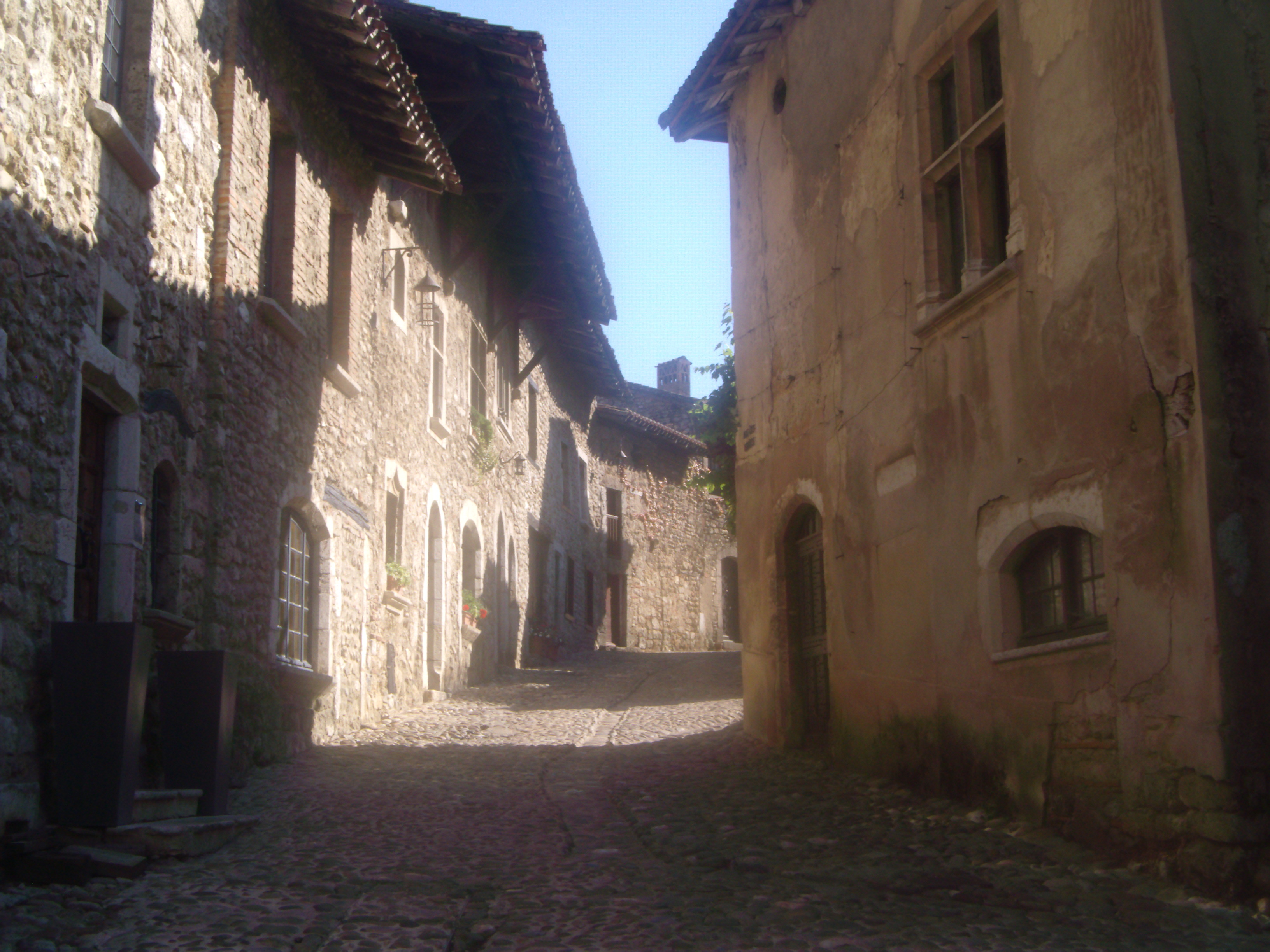 Rhône-Alpes ; Ain ; Pérouges Maisons dans les rues du village de Pérouges